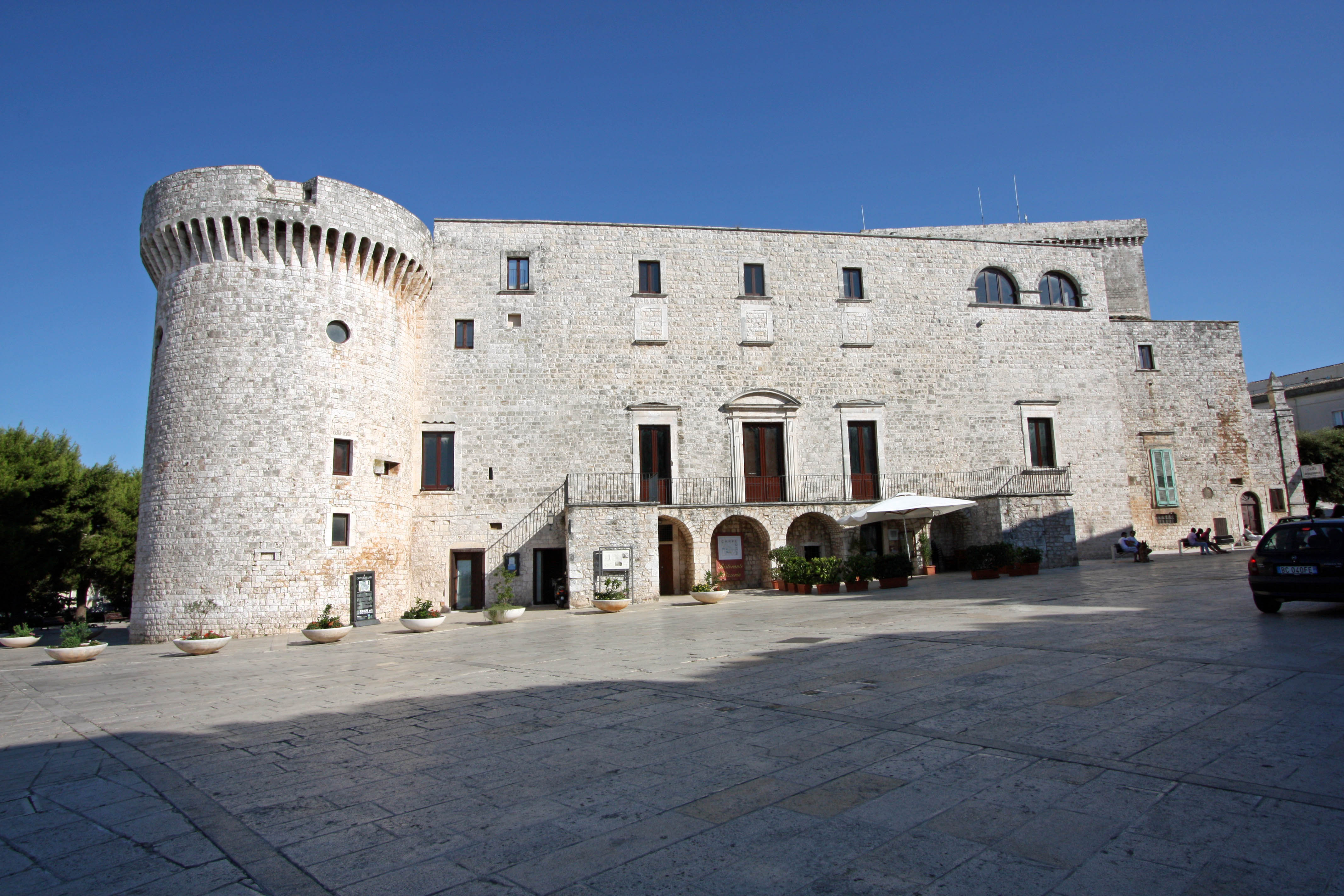 Conversano: Castello Acquaviva, lato nord-occide